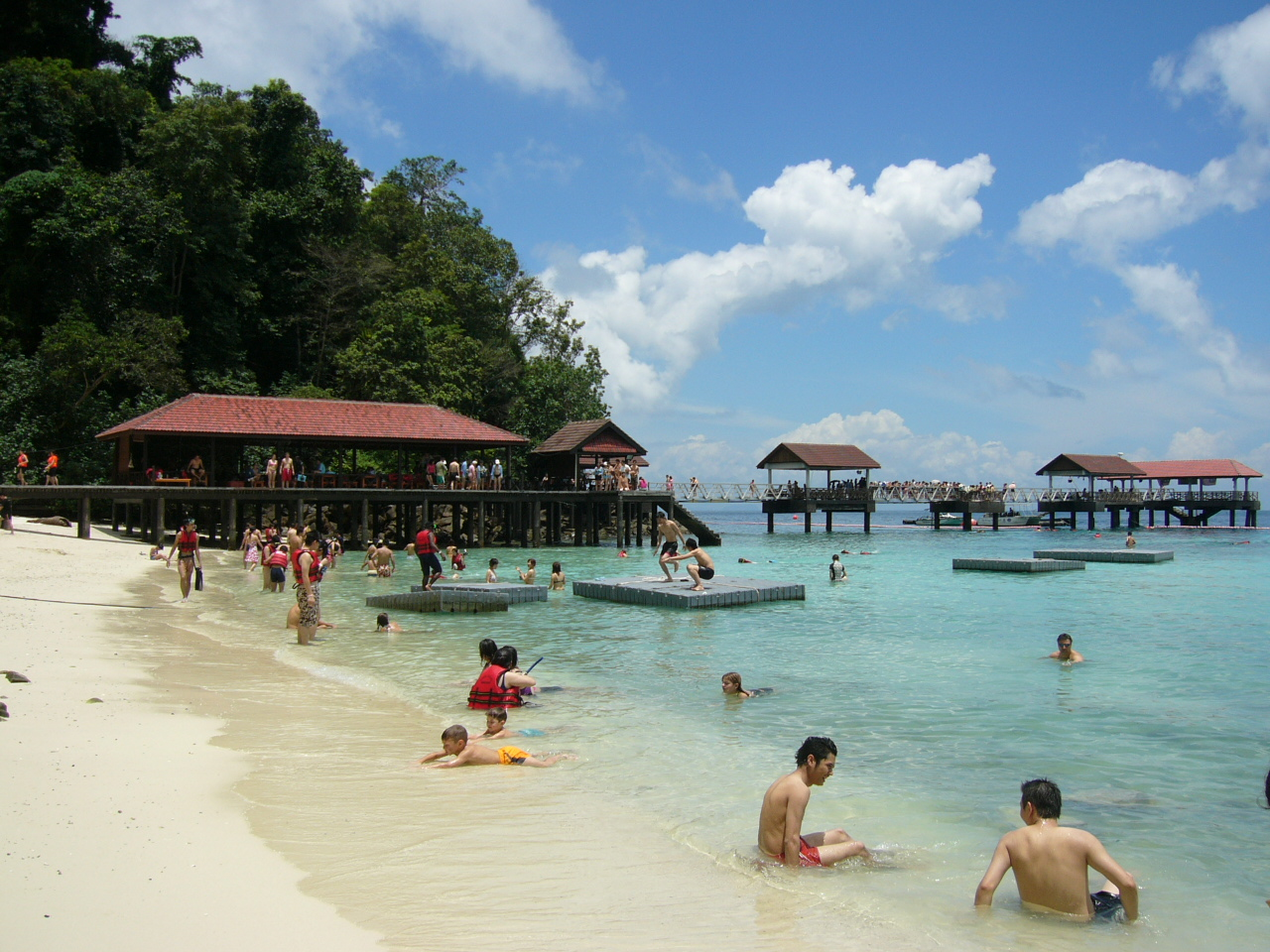 kanon chanda phone 01752944537